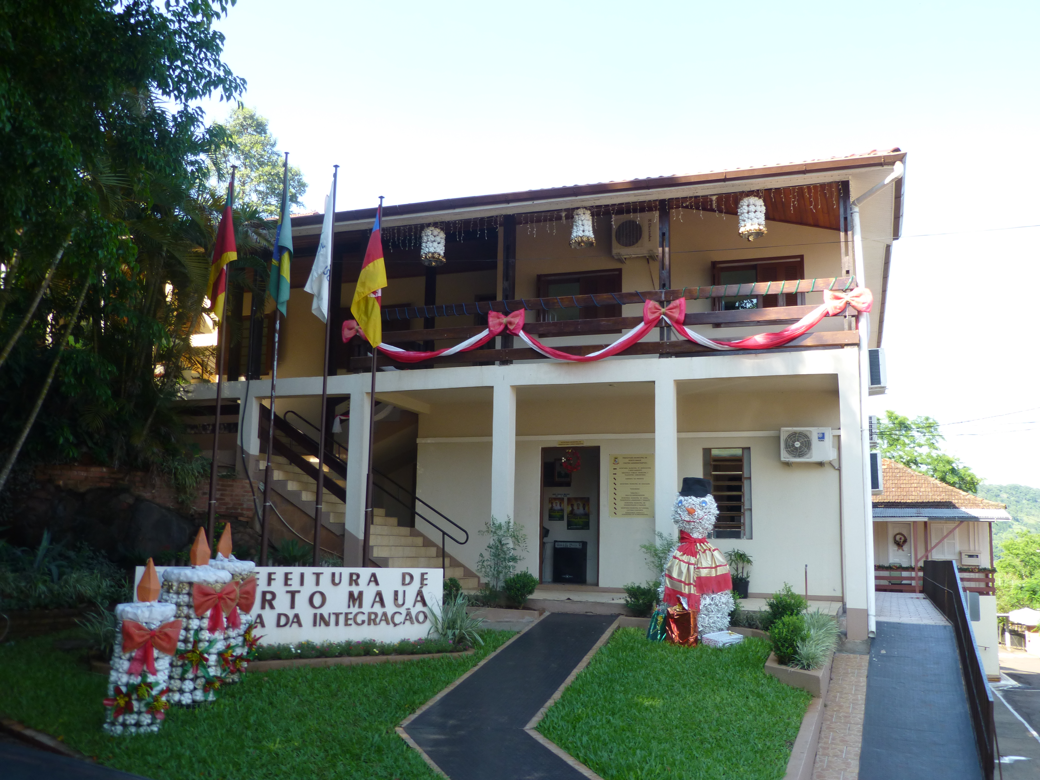 Edificio de la Prefeitura Municipal de Porto Mauá, en el estado brasileño de Rio Grande do Sul